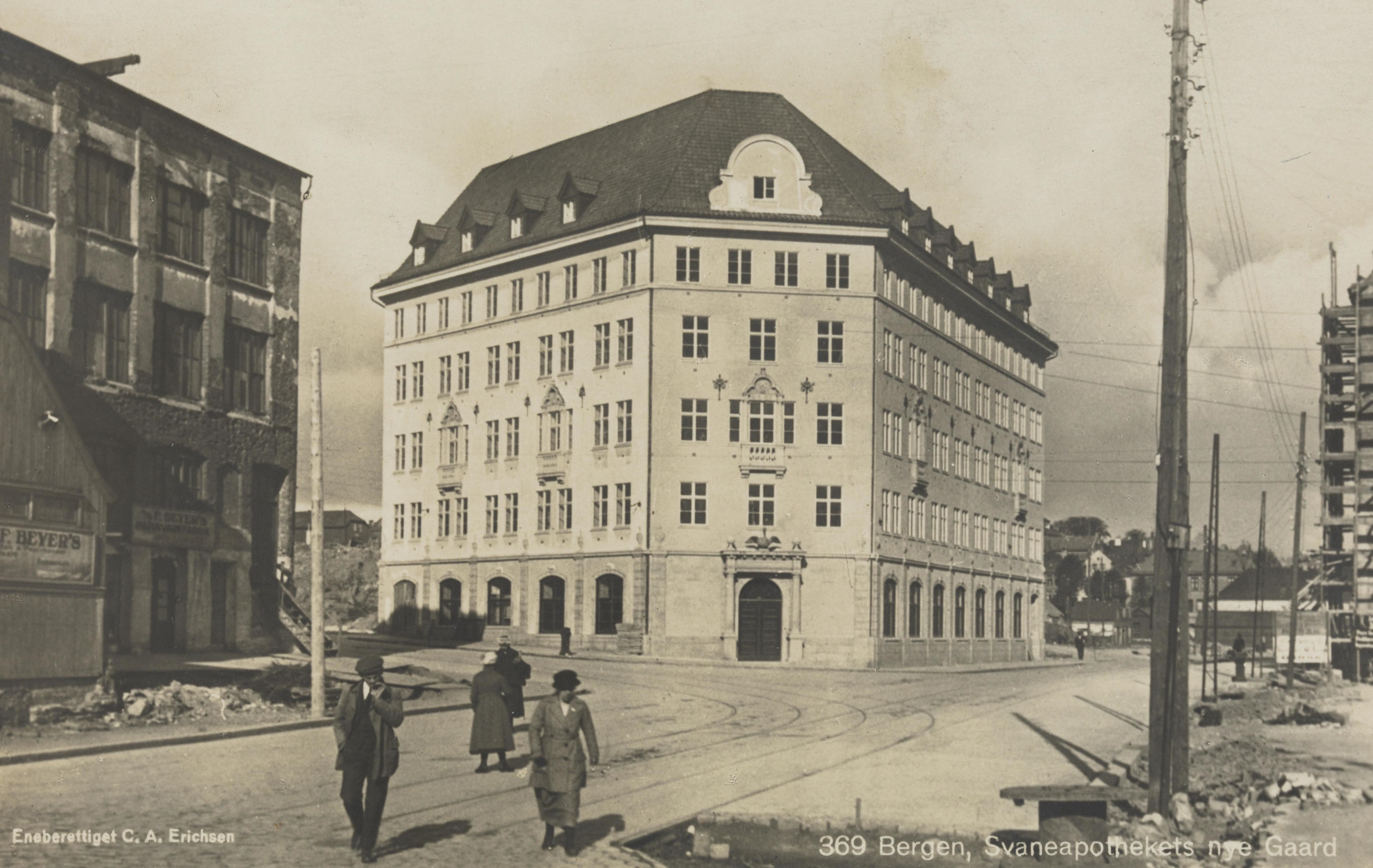 Bildet er hentet fra Nasjonalbibliotekets bildesamling Bergen, Hordaland